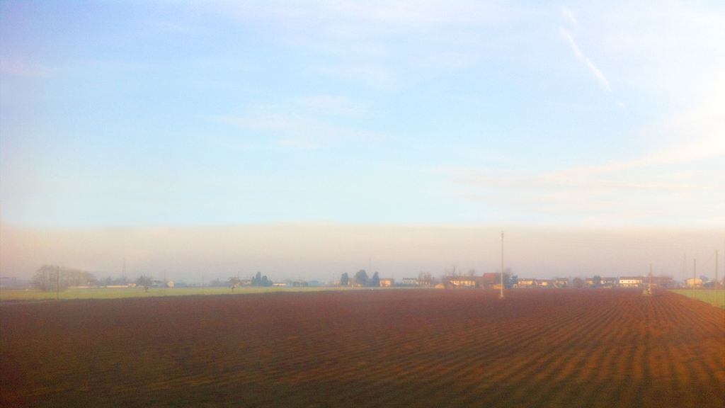 Scorcio del paesaggio tipico della Fraschetta tra Alessandria e San Giuliano Nuovo